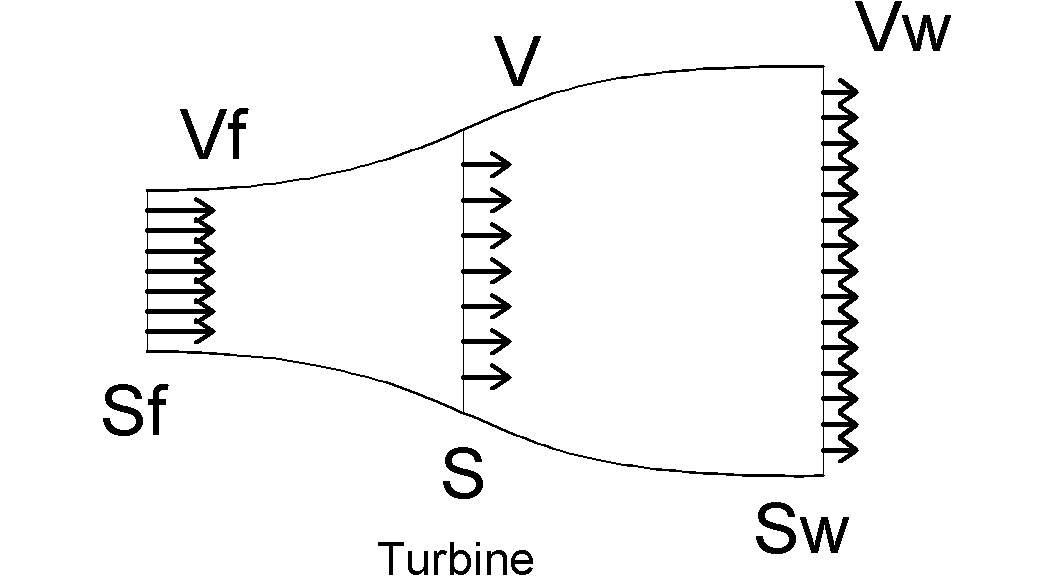 Représentation des vitesses et des surfaces